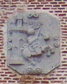 Relieve del escudo de la villa de Arévalo en la fachada de la casa de los Sexmos